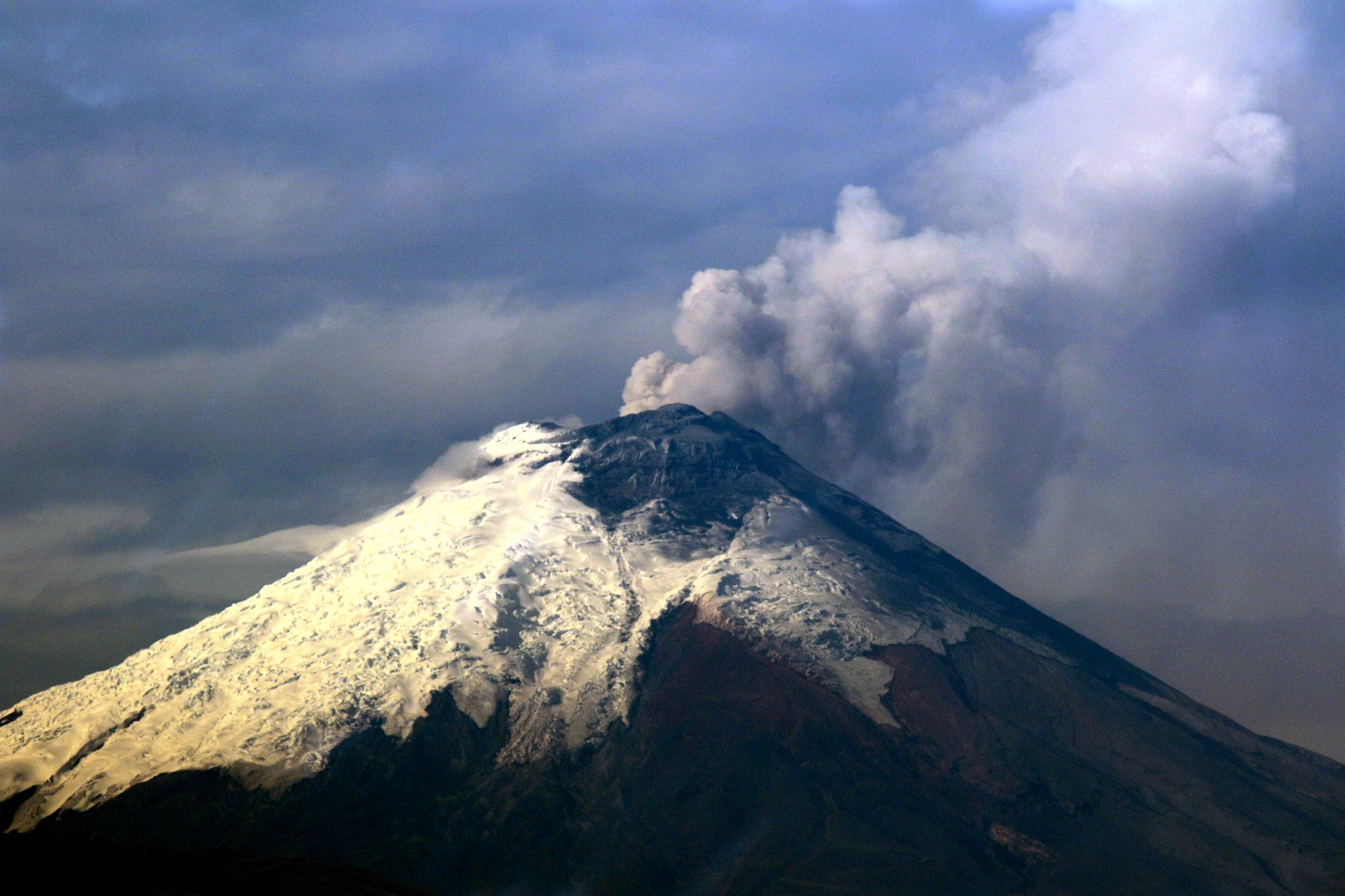 Quito, 11 de sept. (Andes).-Continua el proceso eruptivo del volcán Cotopaxi.Foto:César Muñoz/Andes